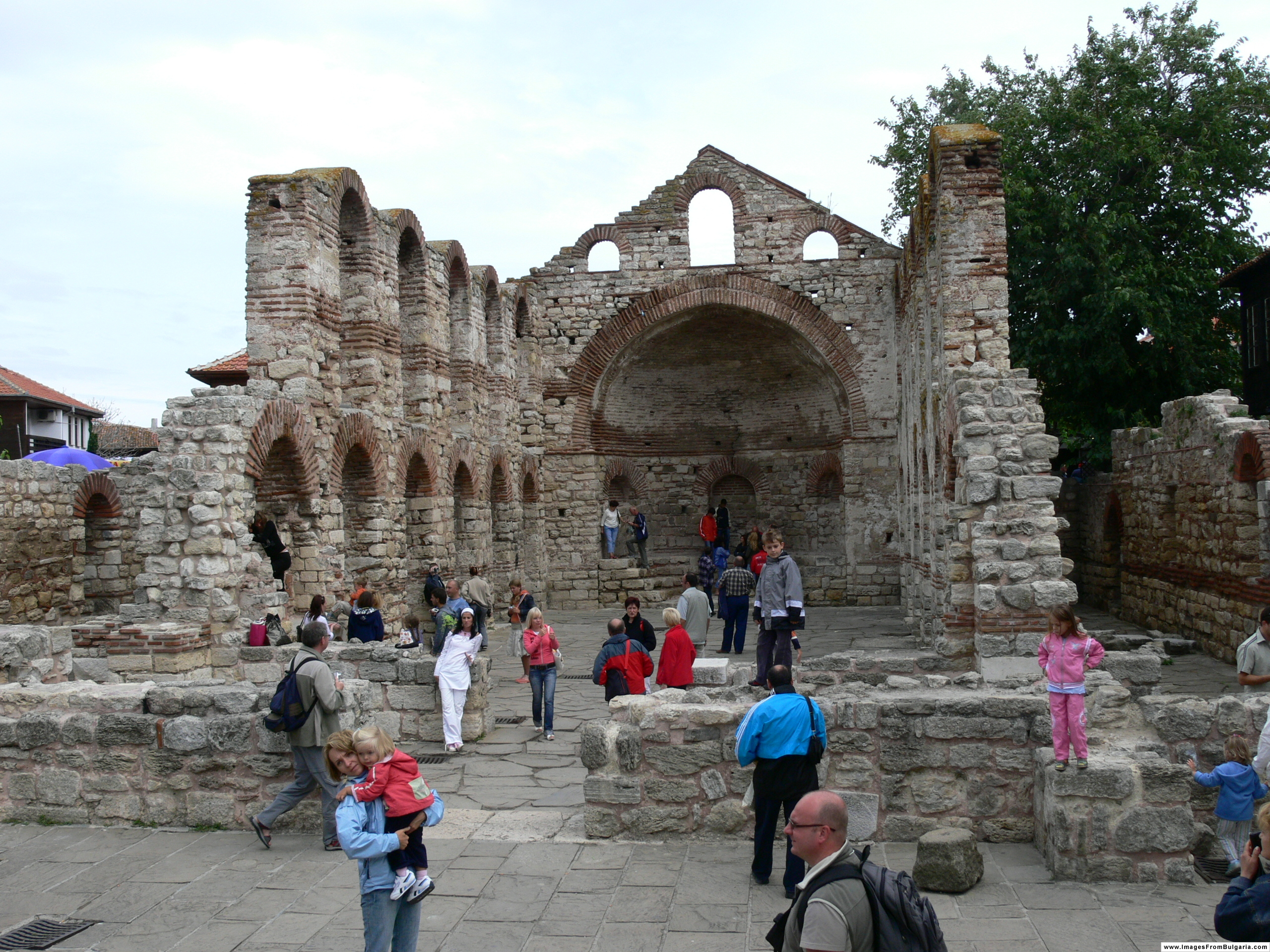 Nesebar, Bulgaria